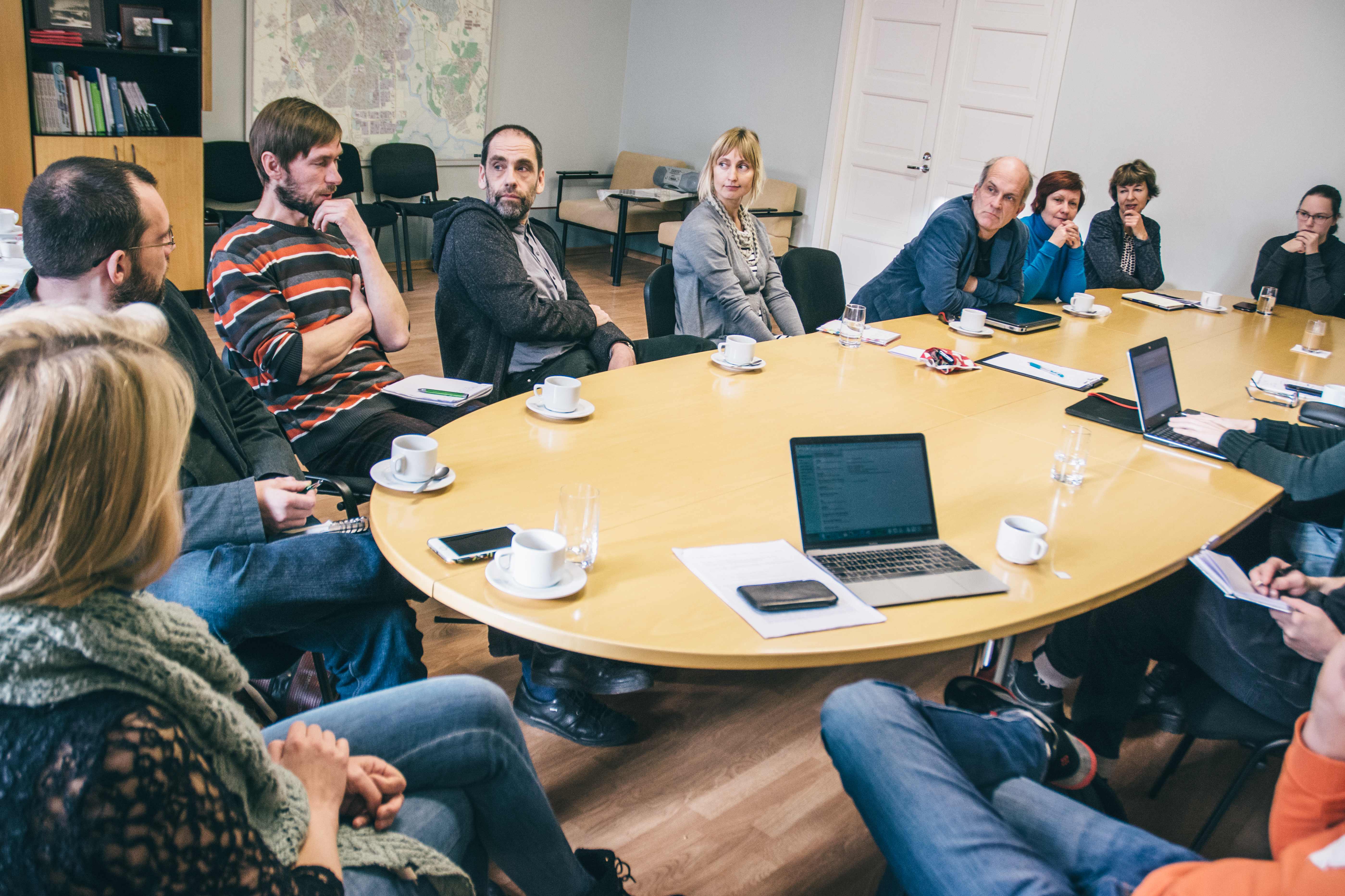 kirjanduse ümarlaud